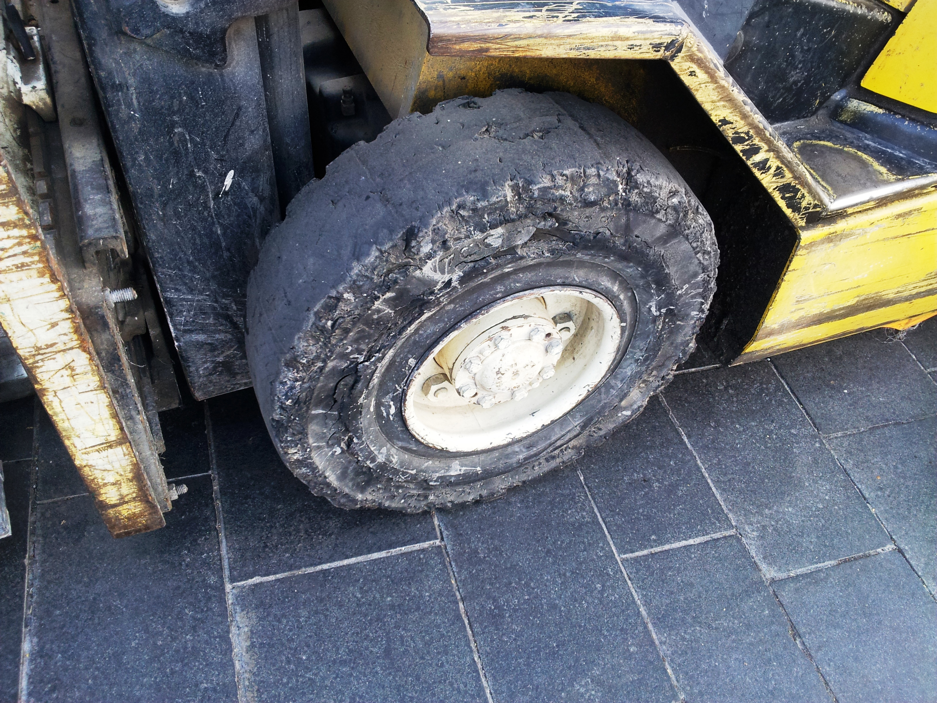 צמיג לא פניאומטי